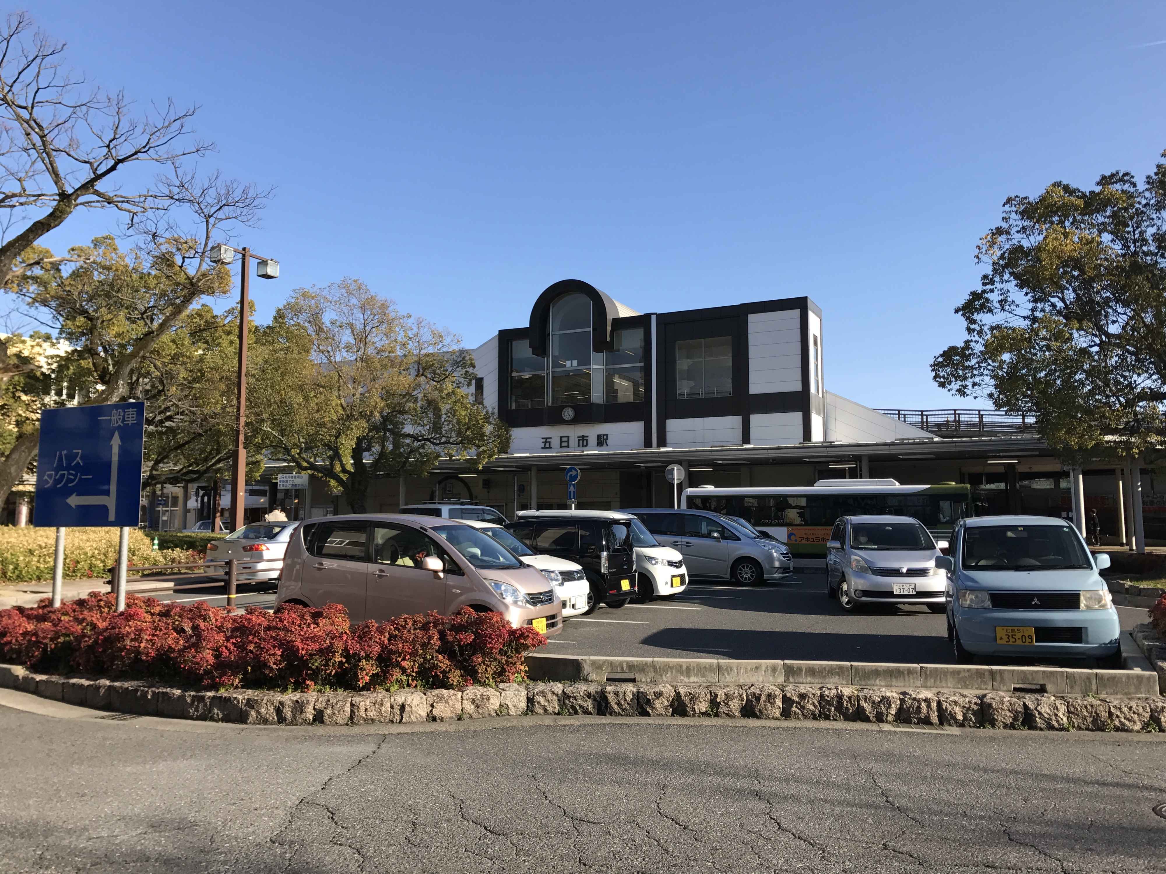 五日市駅・広電五日市駅北口